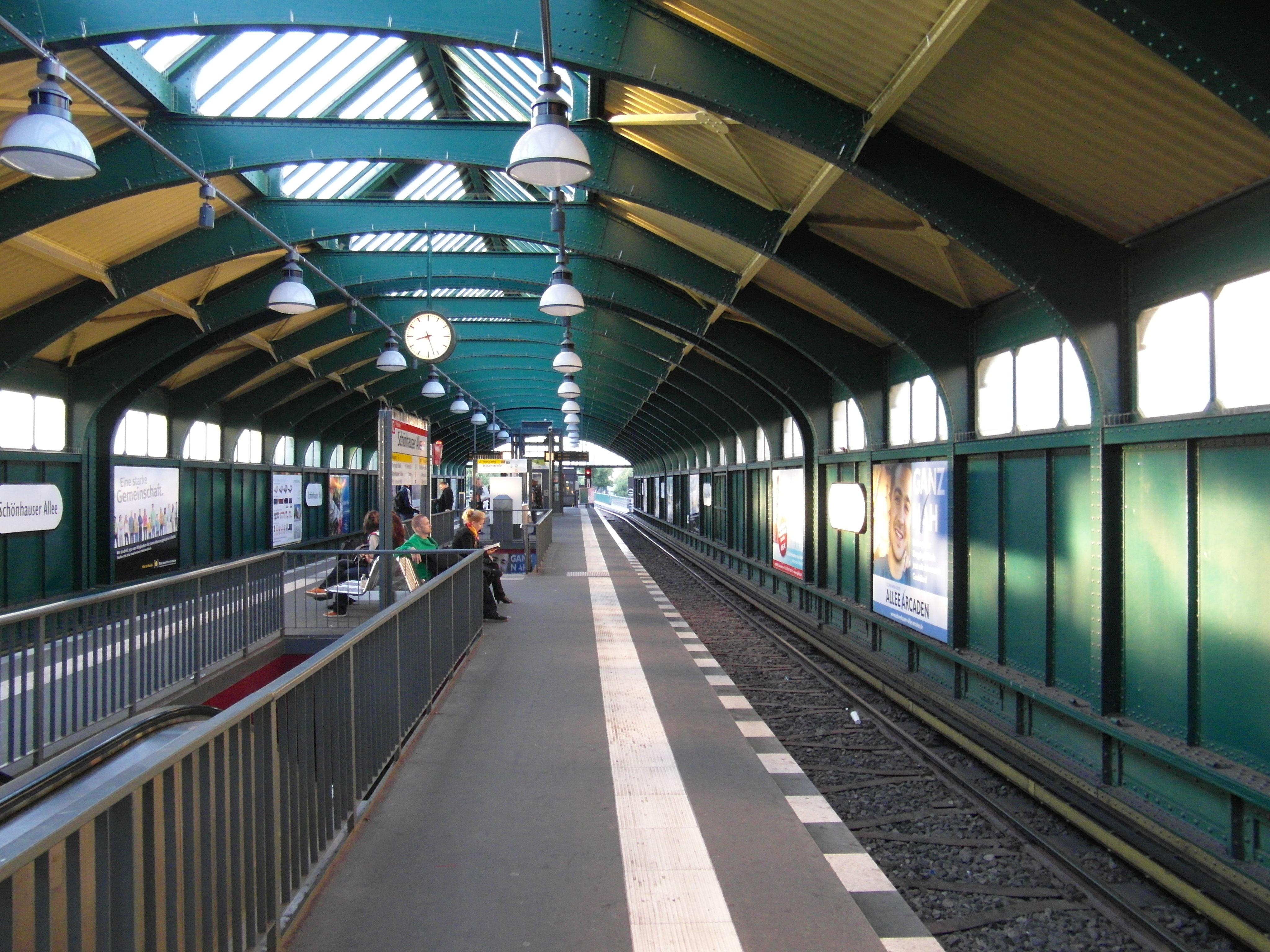 Berlin - U-Bahnhof Schönhauser Allee - Linie U2